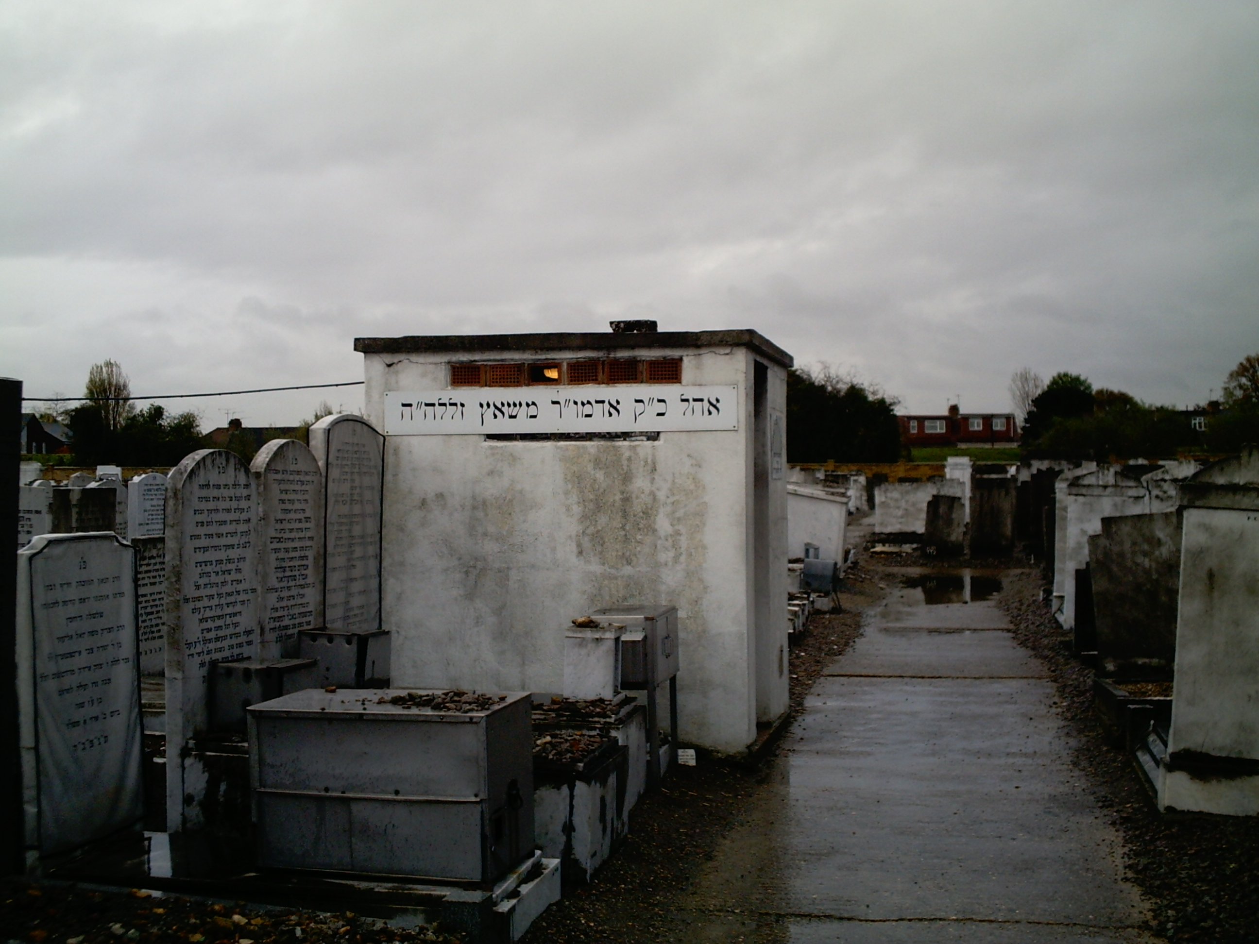 אהל על ציונו של הרבי משאץ, בבית העלמין בלונדון